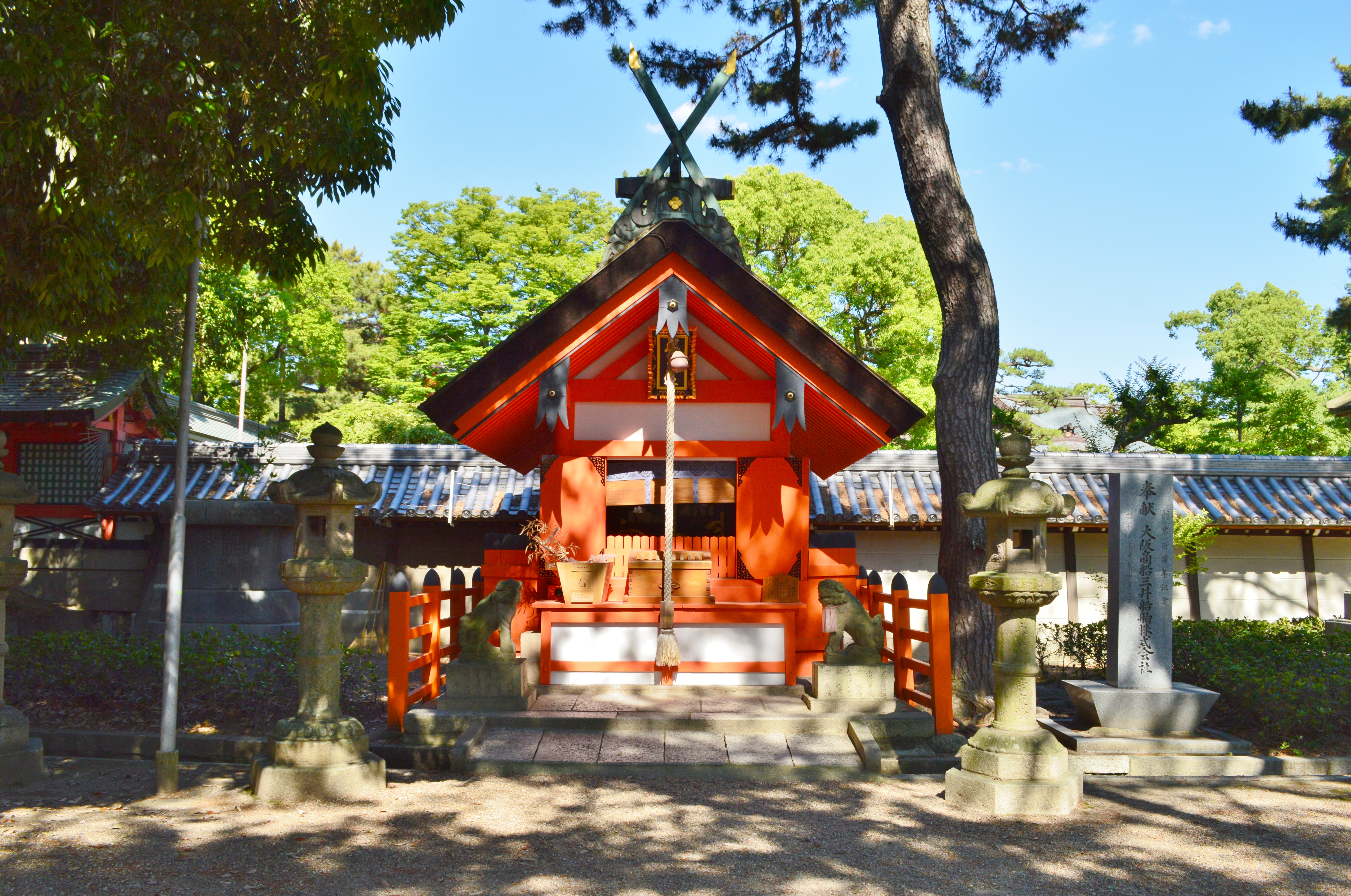 住吉大社境内摂社 船玉神社